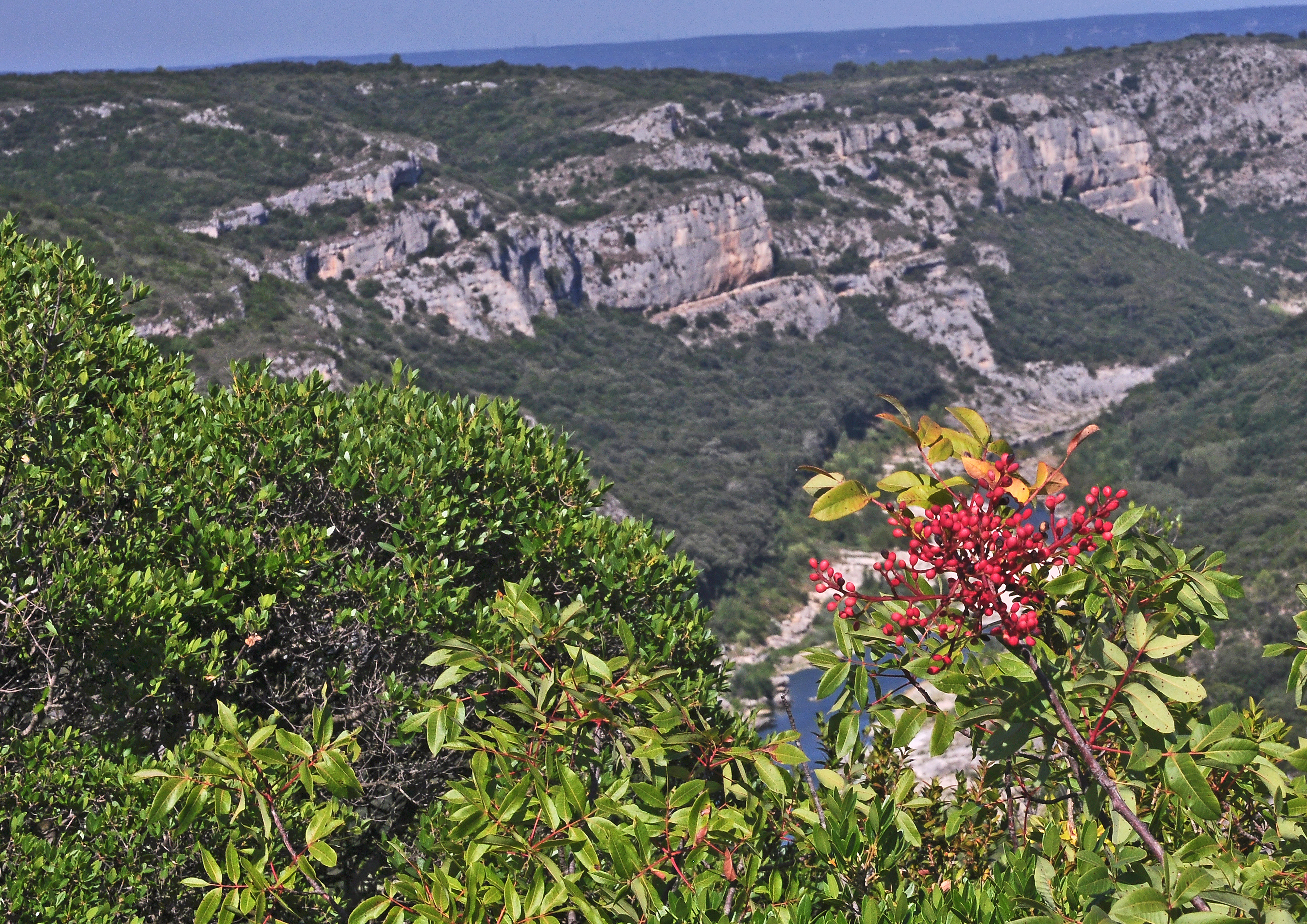 Un sol de prédilection : les terrains calcaires de Garrigues.Au fond les gorges du Gardon. Terrain de plantes calcicoles: chênes verts arbousiers et filaires. Nous sommes en AOUT , arrivent les jeunes fruits du pistachier térébinthe. Autour de cet arbuste, son milieu botanique.